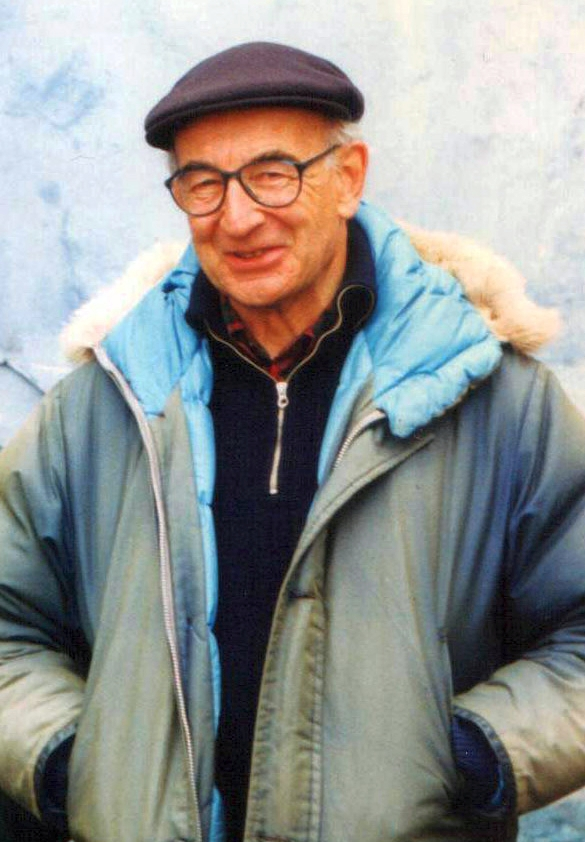 Hansjürgen Müller-Beck (1995) in Sibirien